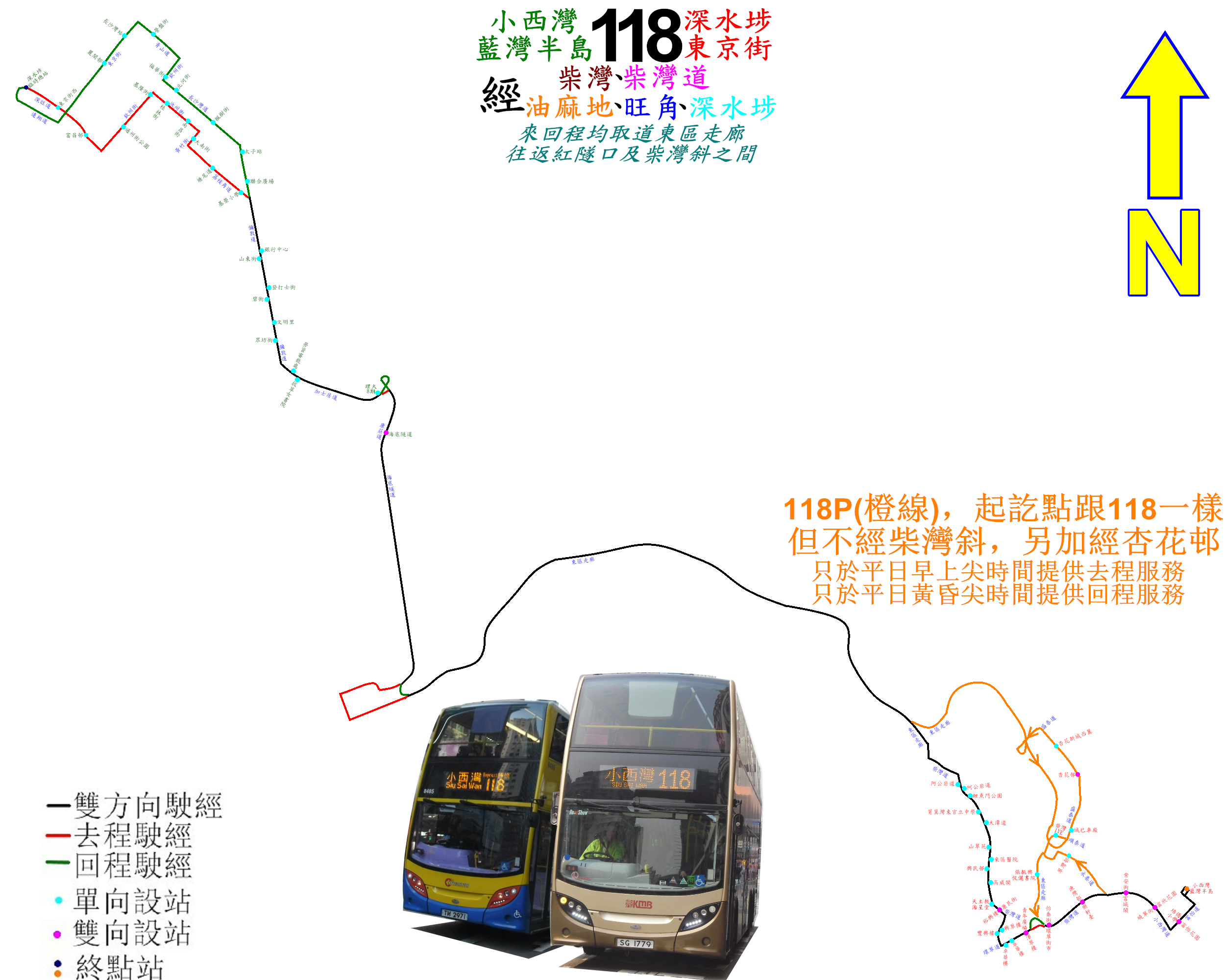 中文（香港）: 過海隧巴118線的走線圖